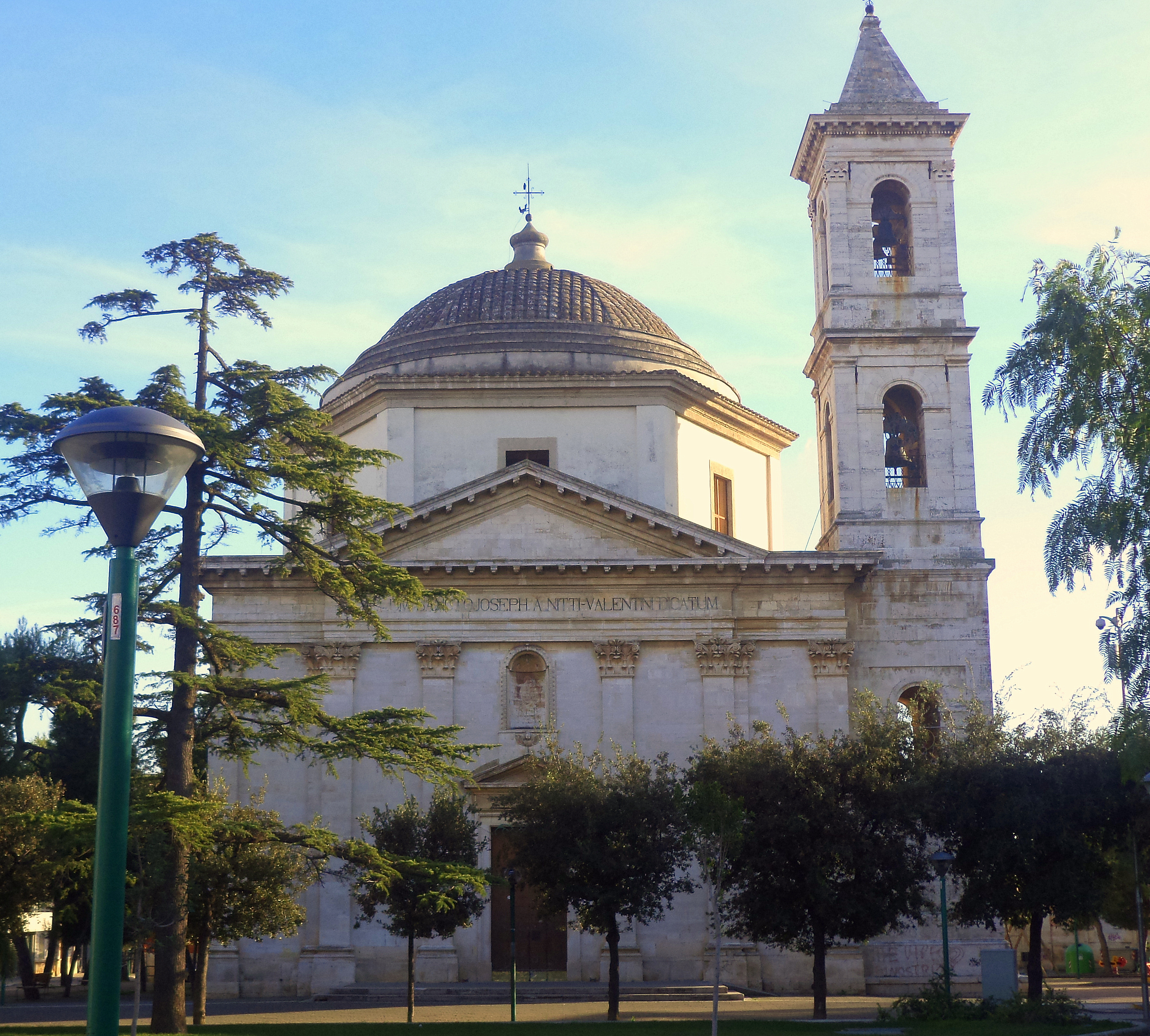 Prospetto principale